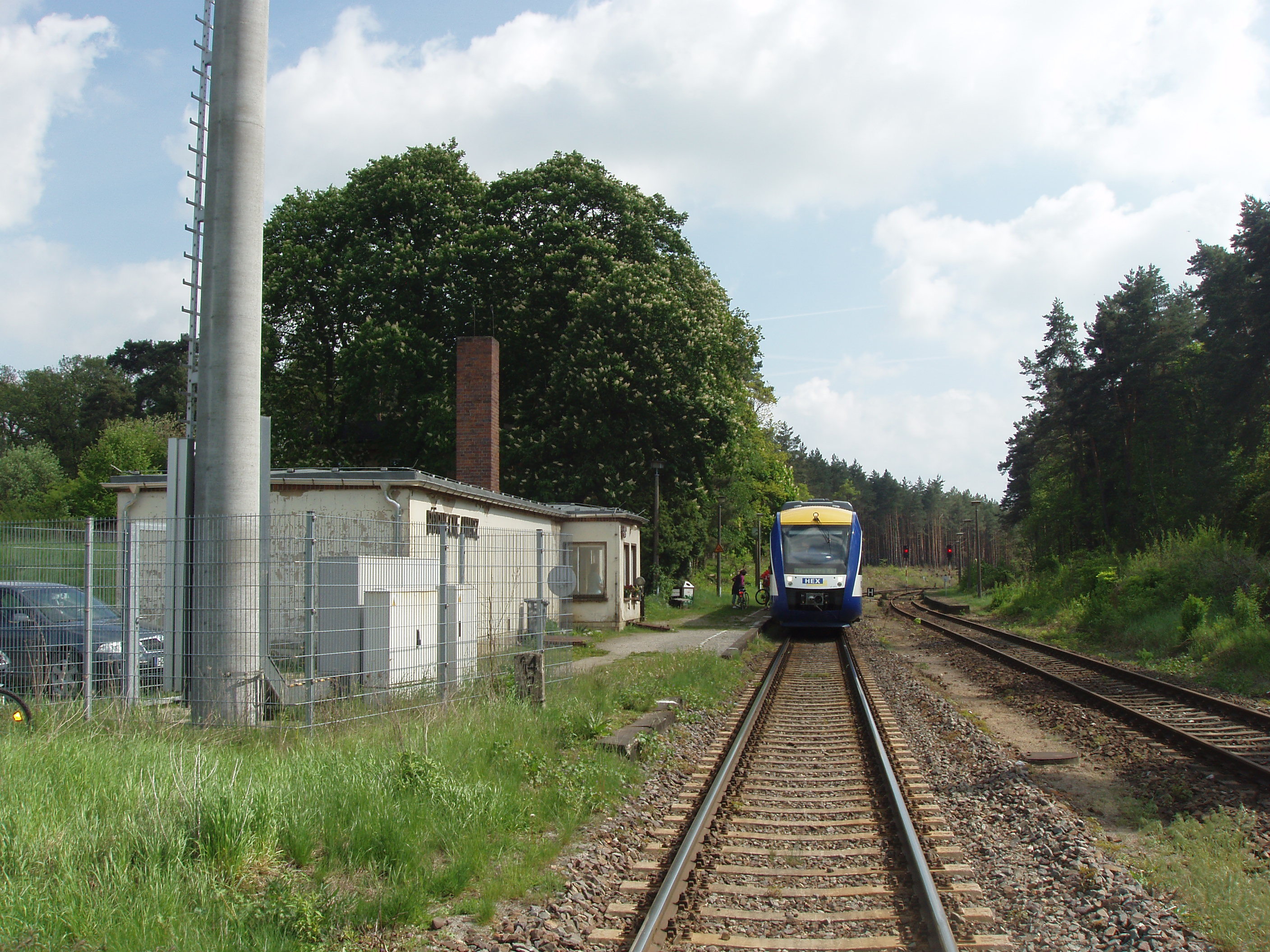 Börnecker Bahnhof mit Triebwagen des Harz-Elbe-Express